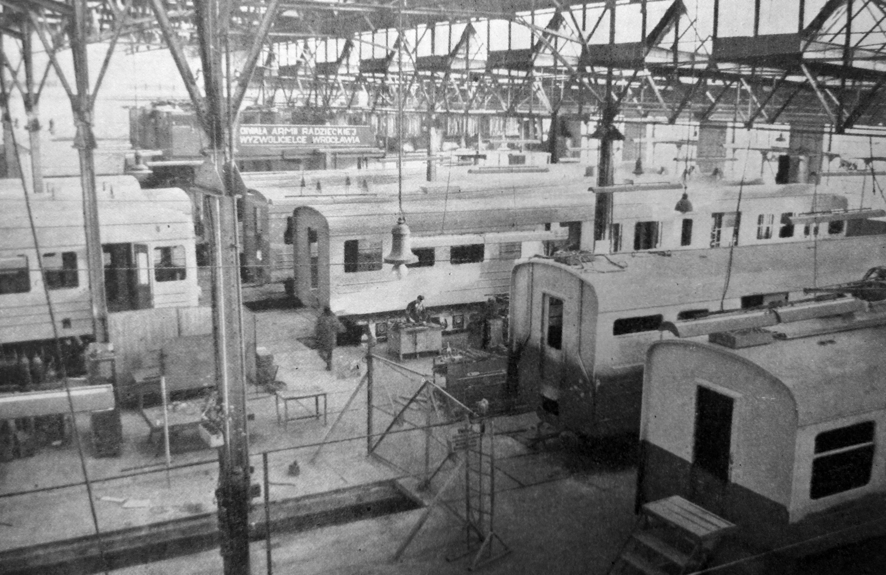 Opis zdjęcia w książce brzmi: „Hala montażowa jednostek pociągowych w Pafawagu (Wrocław)”. W dolnym prawym rogu można zauważyć człon silnikowy i rozrządczy wysokoperonowego elektrycznego zespołu trakcyjnego serii EW55, natomiast pozostałe wagony to człony niskoperonowego EZT serii EN57. Na tej podstawie można wnioskować, że zdjęcie zostało wykonane w 1962.